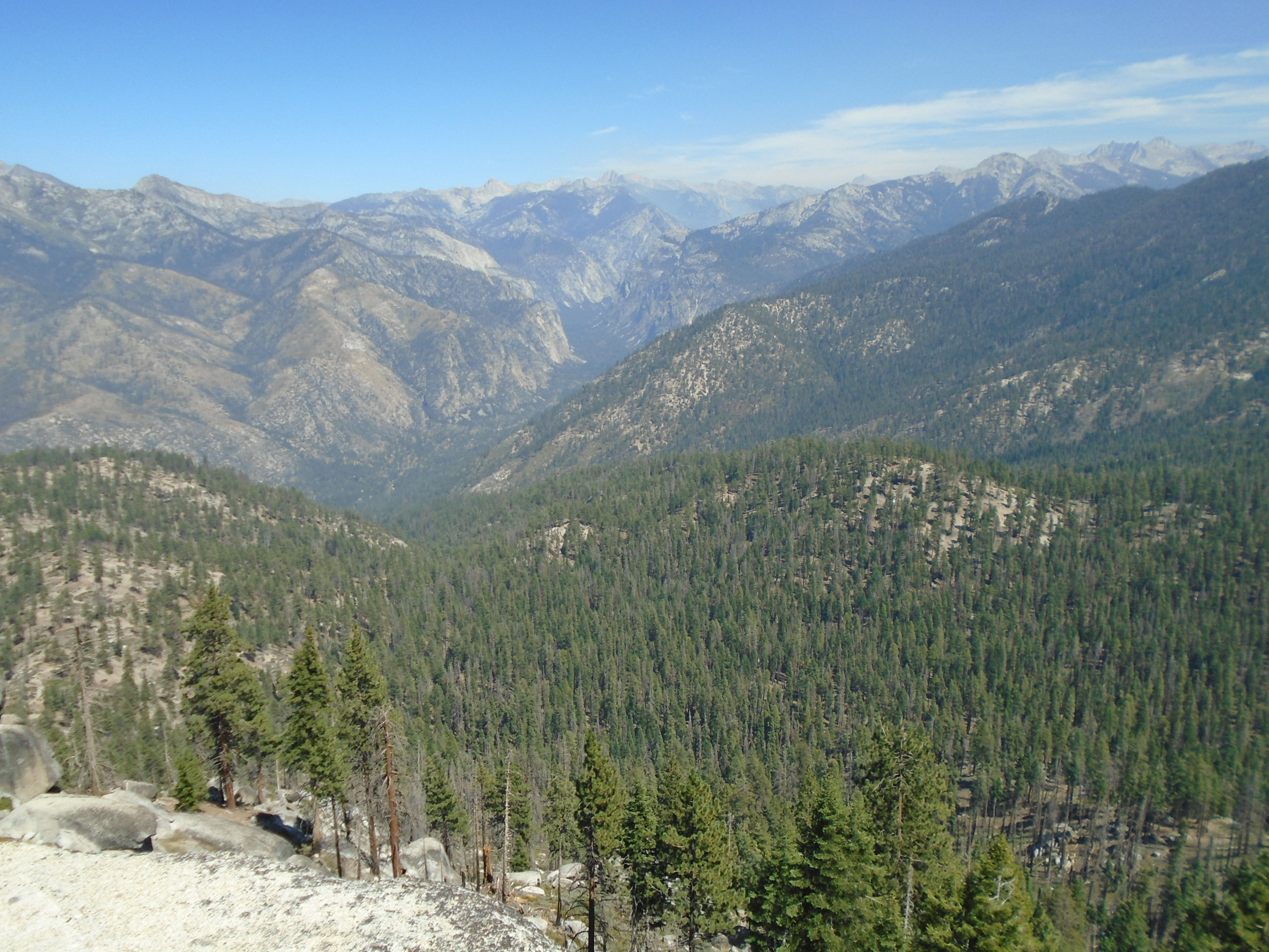 Lookout Peak View, Kings Canyon National Park